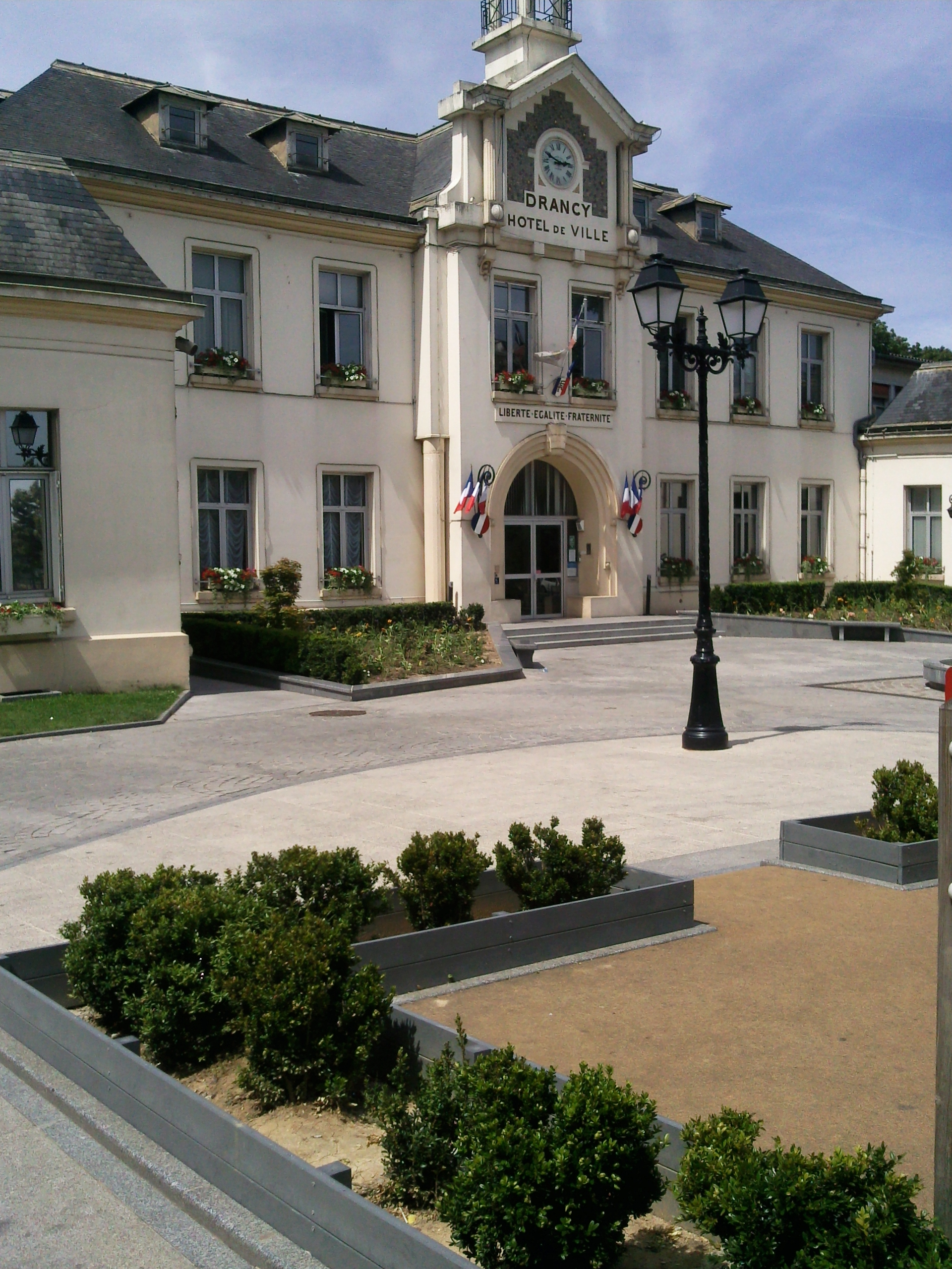 L'Hotêl de Ville de Drancy